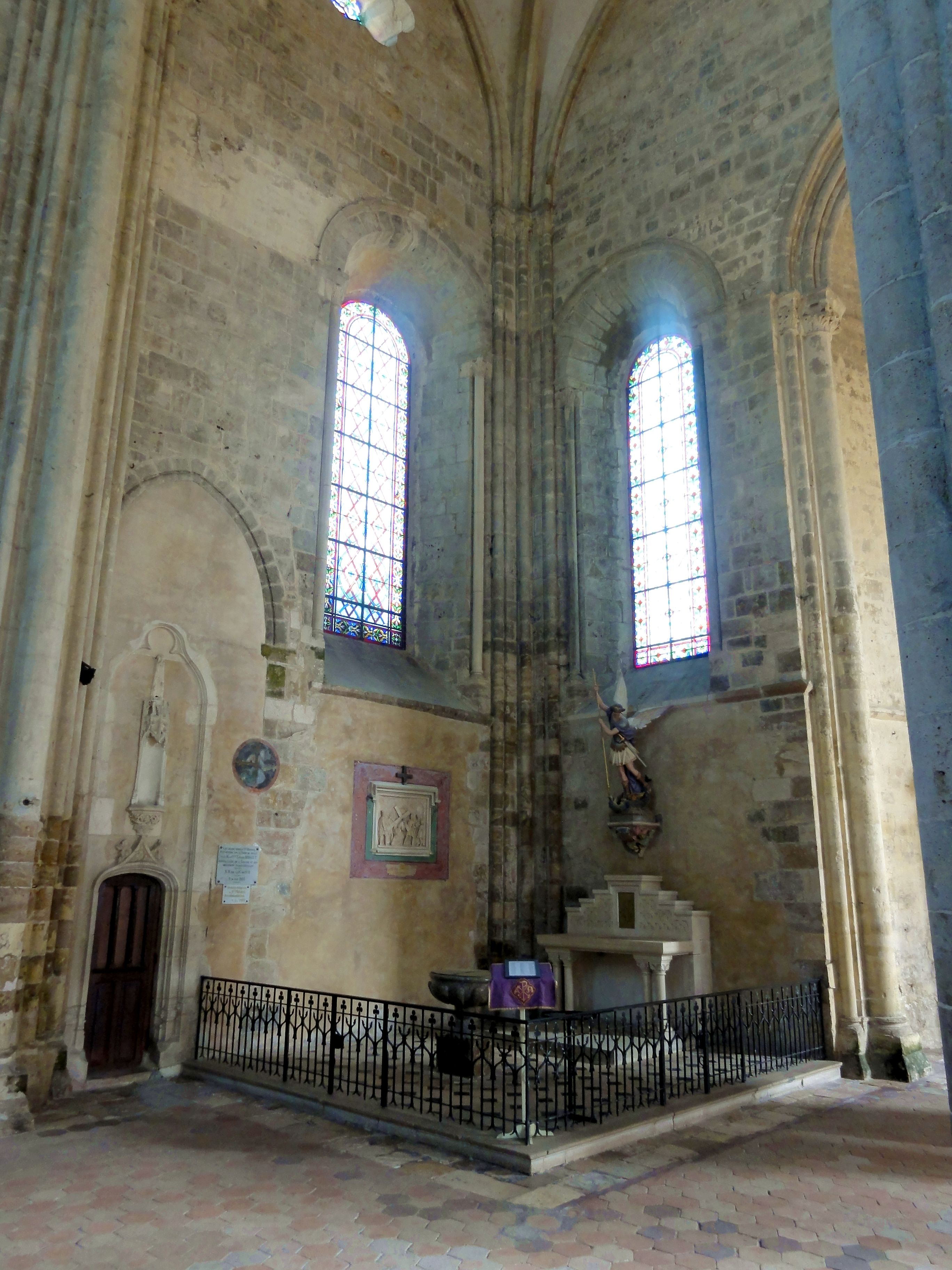 Collatéral nord, 2e croisillon nord, angle nord-est.